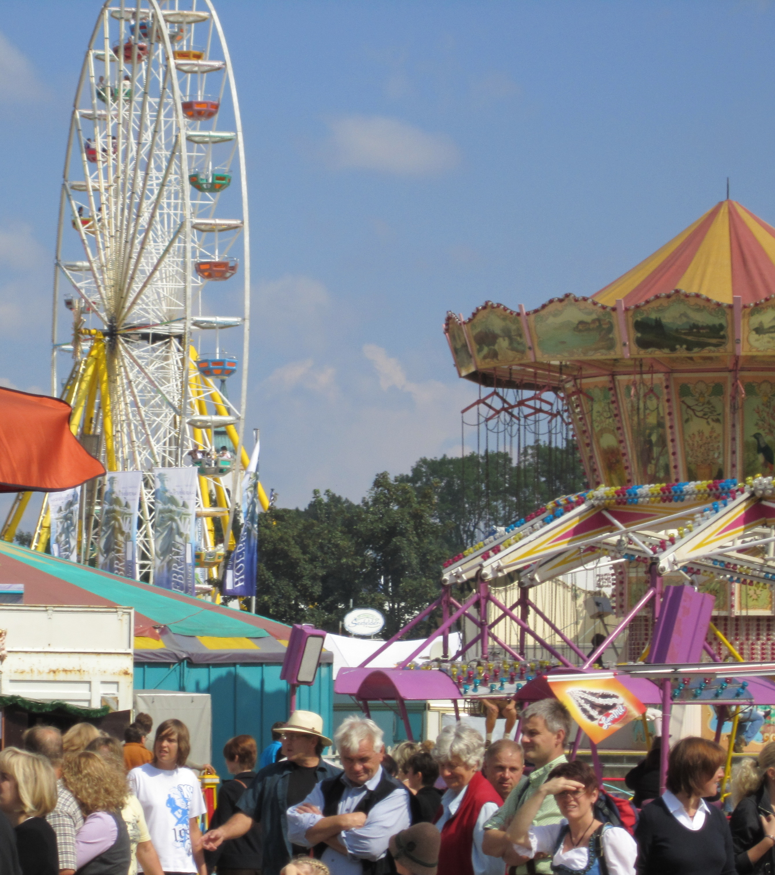 Abensberg, Landkreis Kelheim, Niederbayern: Das Volksfest "Der Gillamoos", das Fest der Hallertau, ist einer der ältesten Jahrmärkte in Bayern.